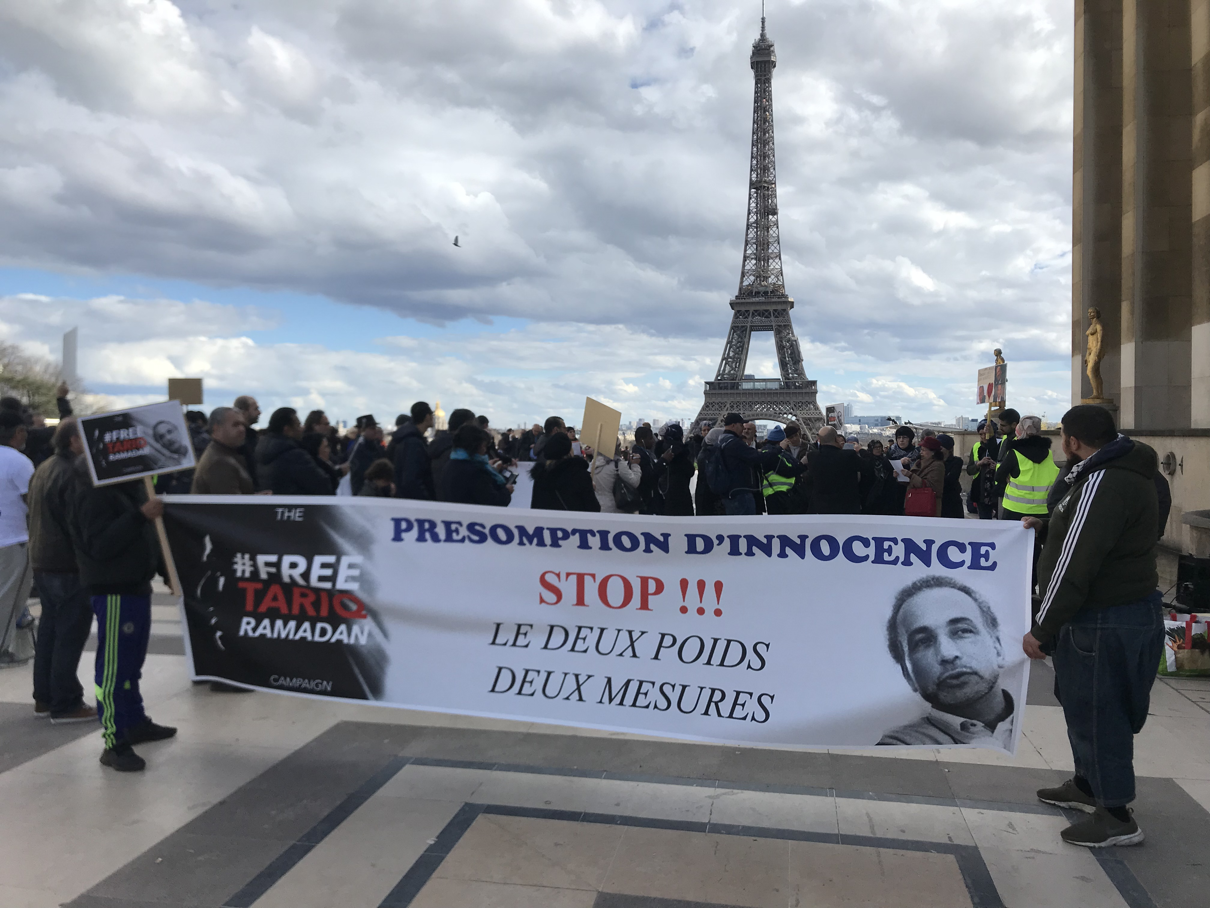 Rassemblement de soutien pour Tariq Ramadan, Paris, le 11 mars 2018.